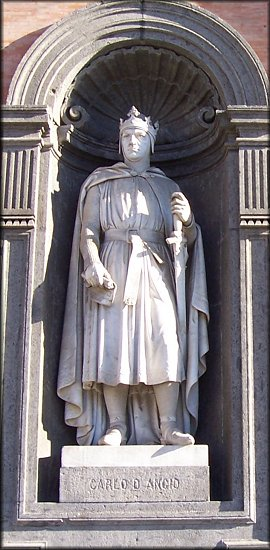 Statua sulla facciata del Palazzo Reale di Napoli: Carlo I d'Angiò - Anjou (Carlo I di Napoli), re di Napoli.